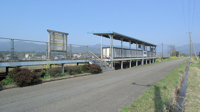 くま川鉄道湯前線ja:新鶴羽駅 外観 撮影者/著者/著作権保有者 : MK Products (本人がアップロード) 撮影日 : 2007/03/30 新鶴羽駅用にアップロードした画像です。良い画像があれば別の画像に変えてください。 Category:鉄道駅画像 Category:多良木町の画像